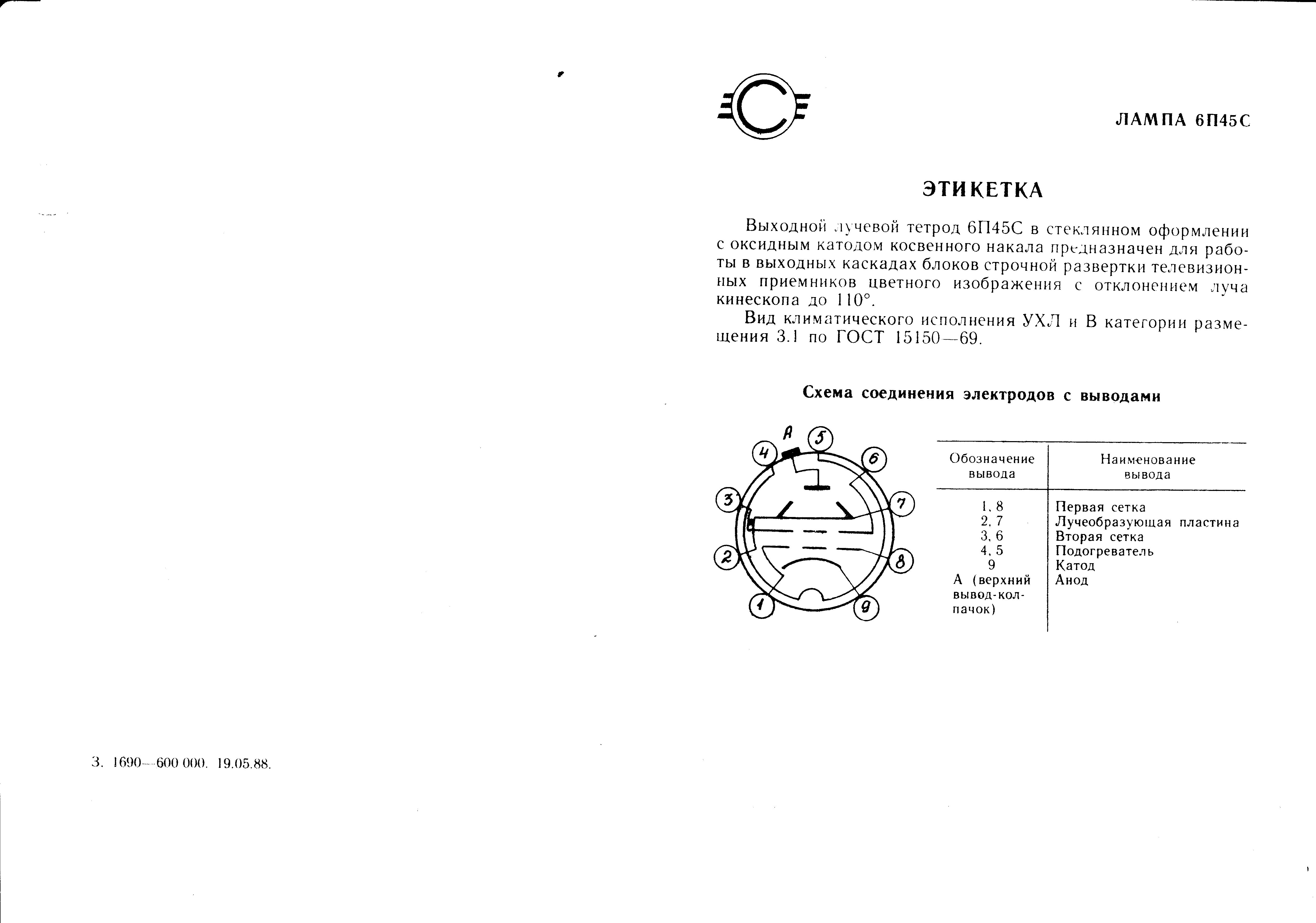 Лампа 6П45С этикетка часть 1